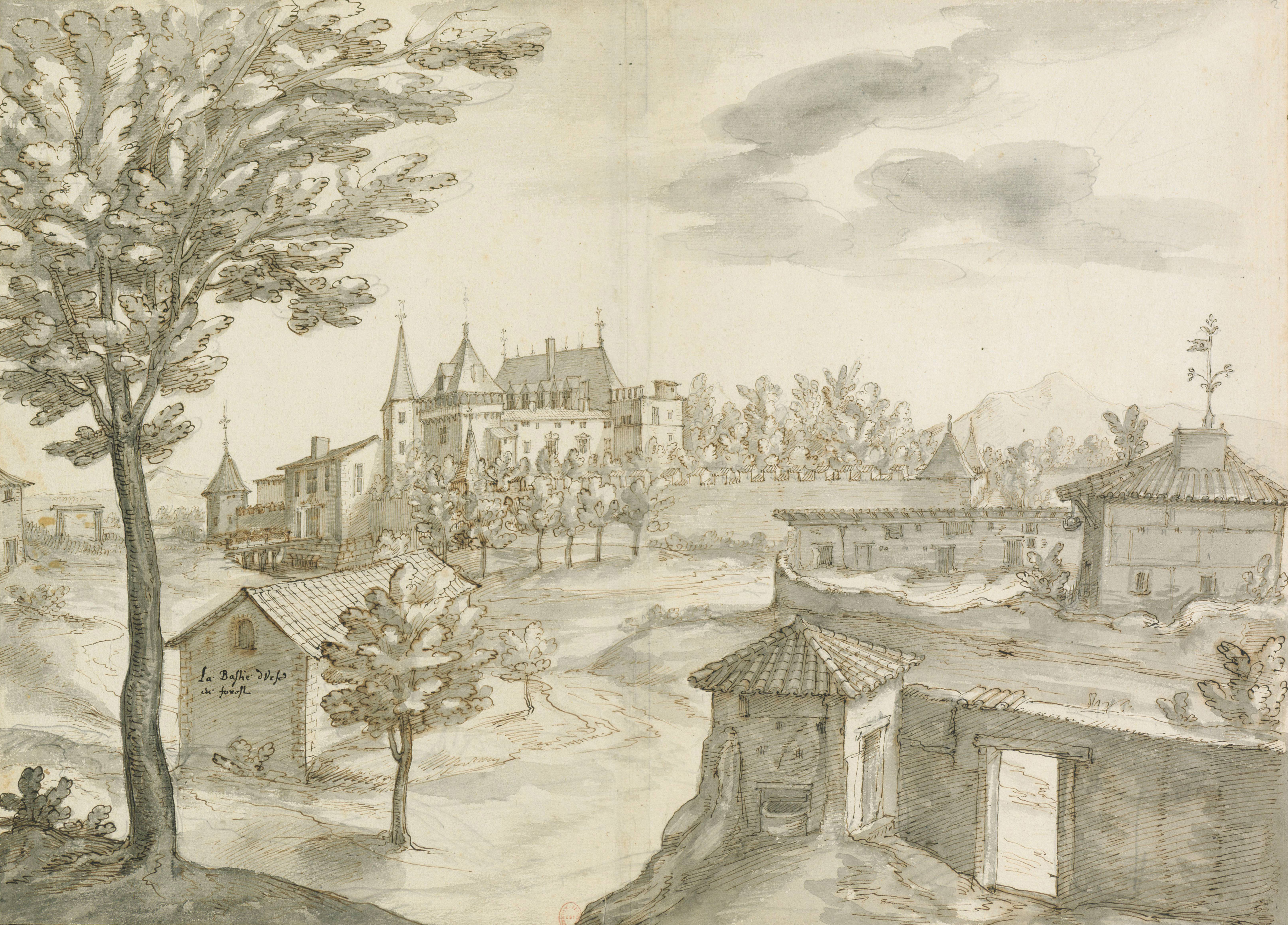 Vogelschau des Schlosses La Bastie d'Urfé, Loire